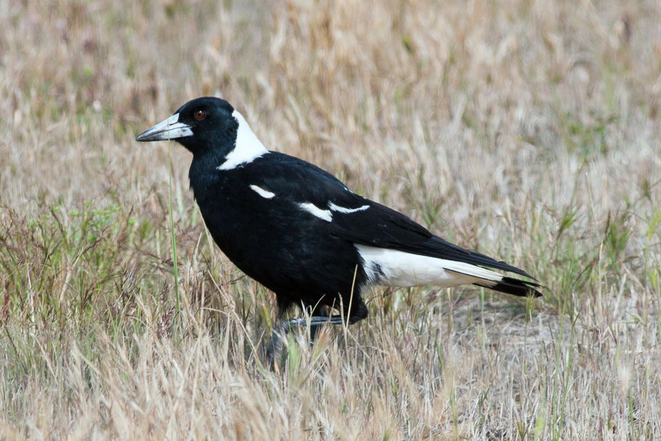 Australian Magpie (Gymnorhina tibicen)